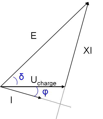 Représentation vectorielle d'un générateur électrique synchrone